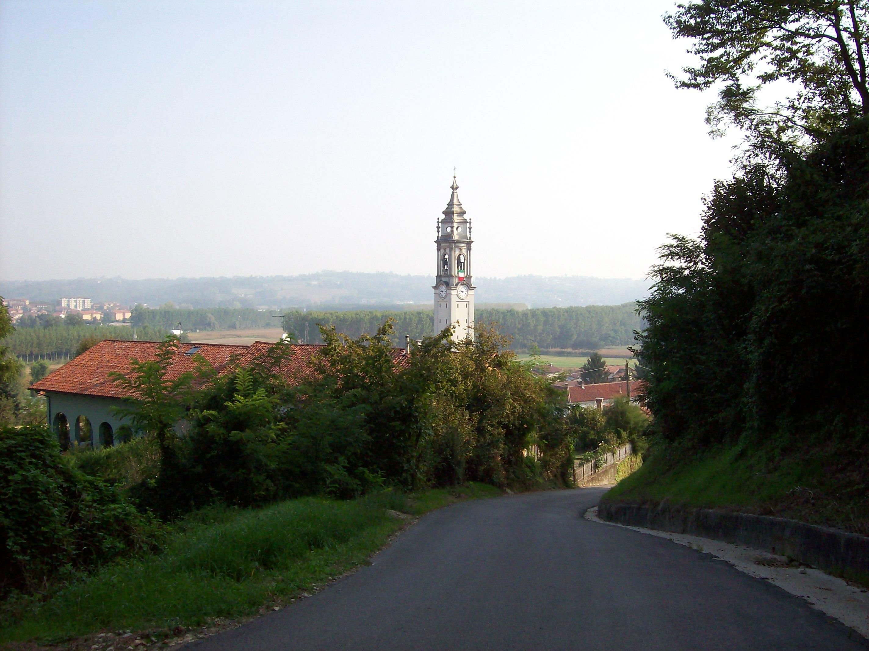 Veduta del centro di Cantarana dalla collina